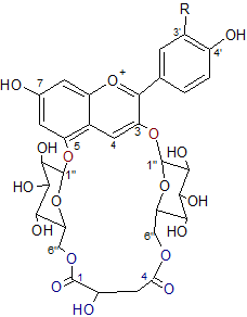 cyclic 3,5 anthocyanoside; R=OH cyanidine ; R=H pélagonidine isolé dans la fleur rouge pourpre de Dianthus caryophyllus